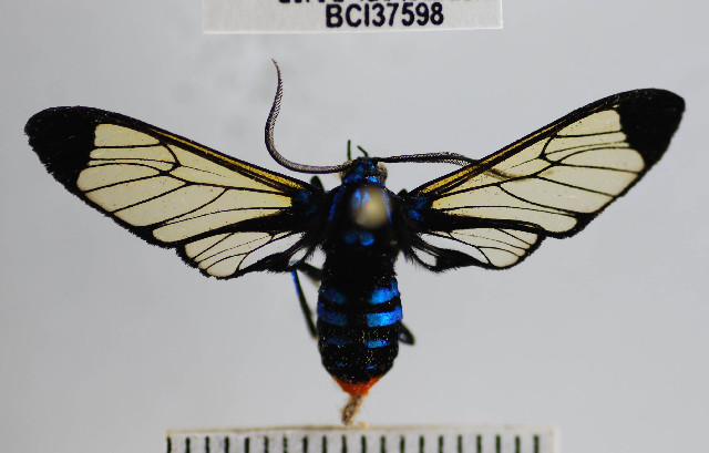 Gymnelia salvini